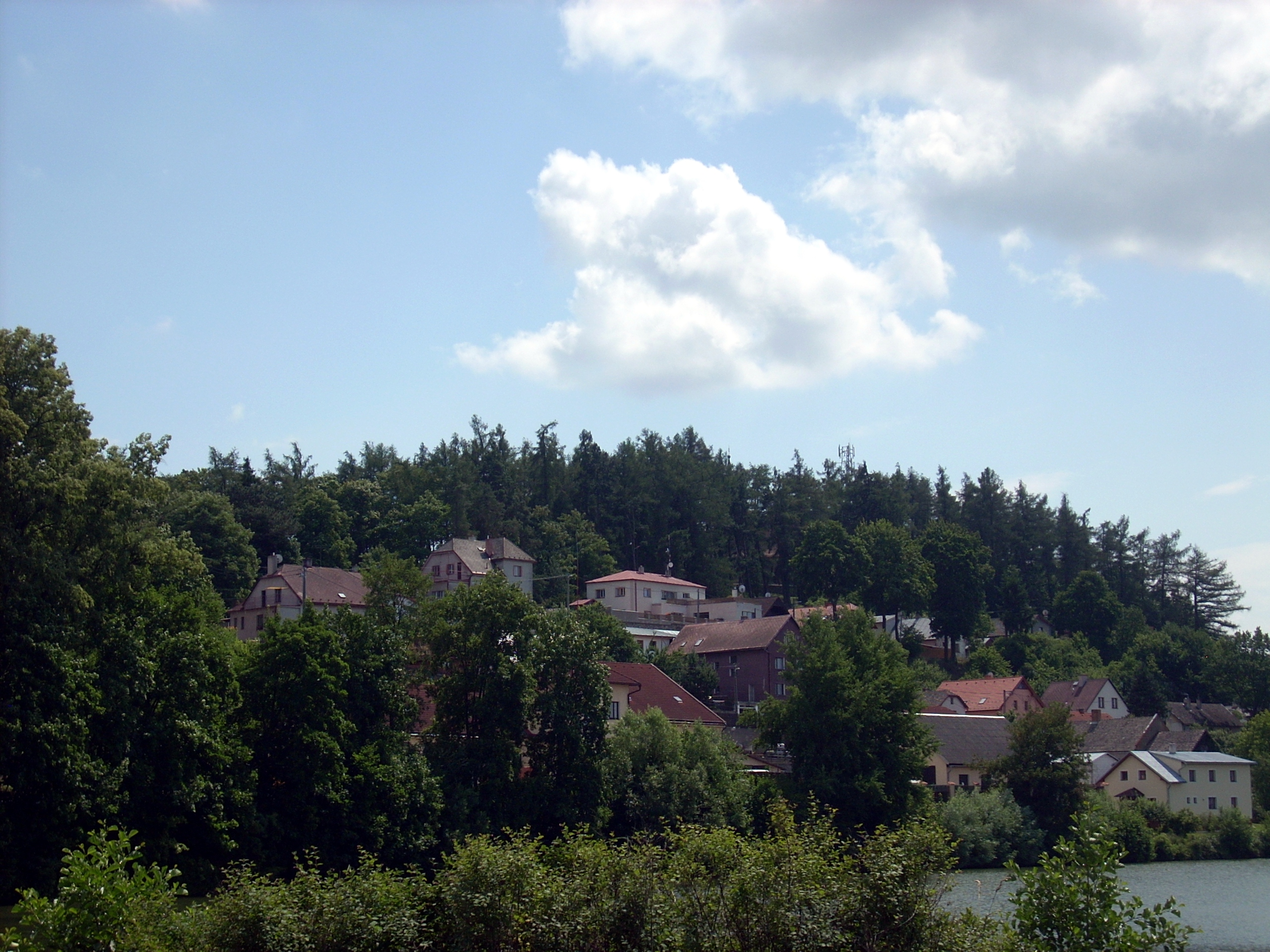 Polná - vrch Kateřinov